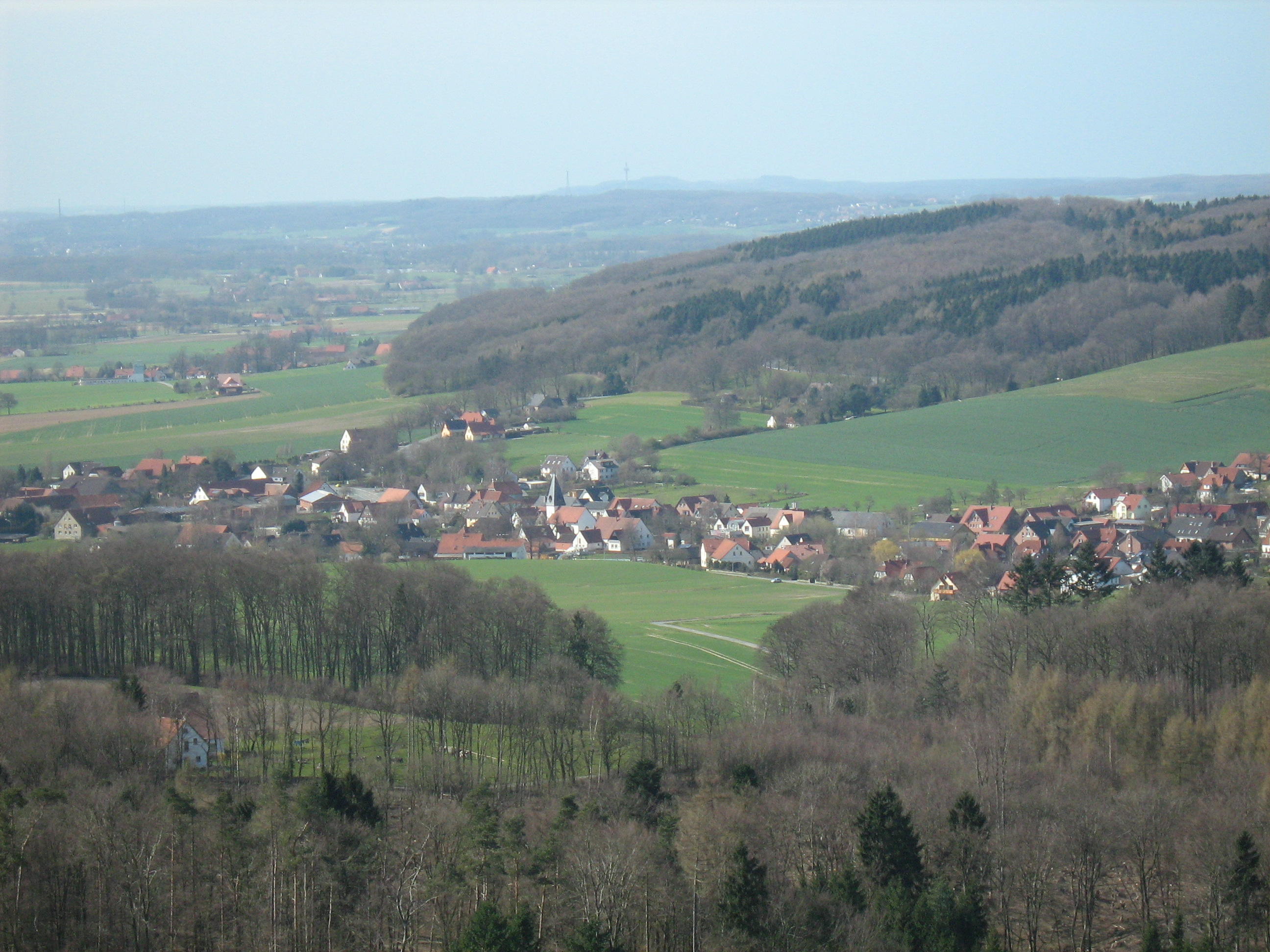 Panorama von Melle(Stadtteil Oldendorf) am Südwesten vom Wiehengebirge.